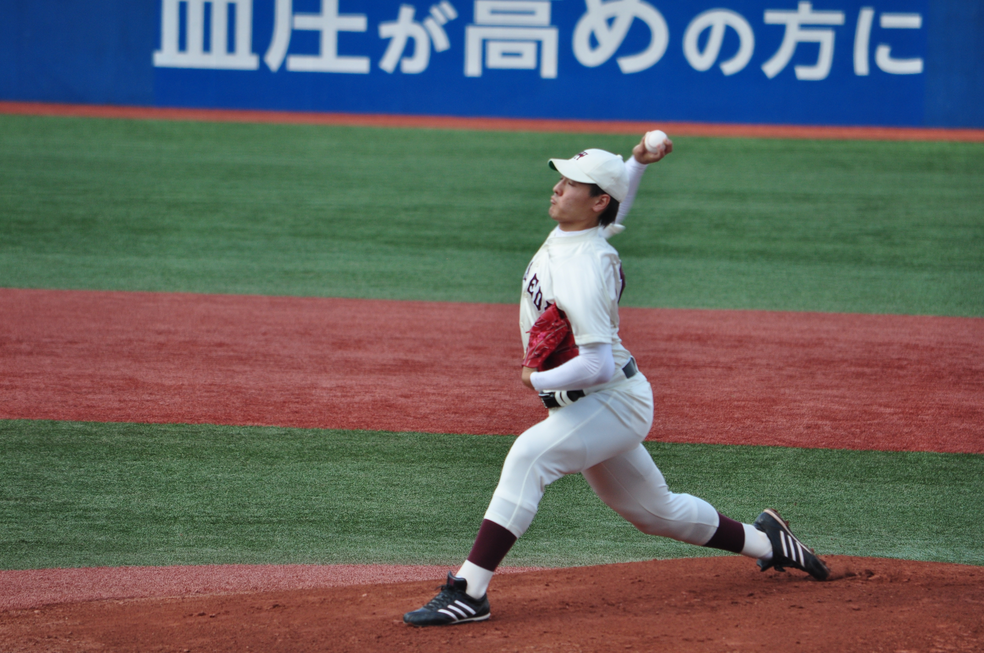 有原 航平